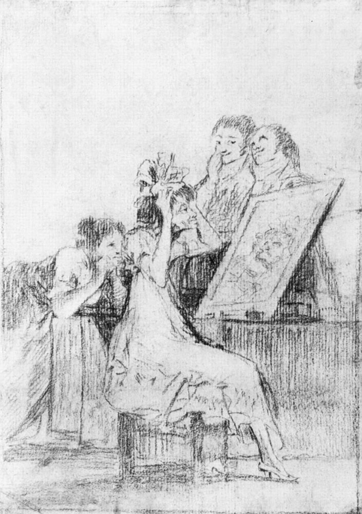 Dibujo preparatorio del capricho nª 55.